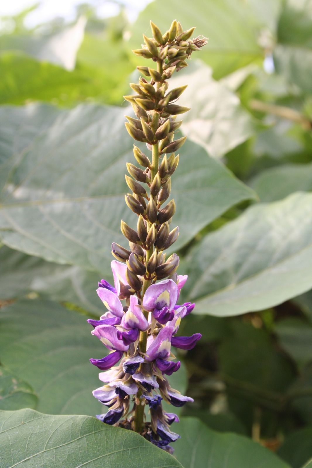 Pueraria montana var. lobata